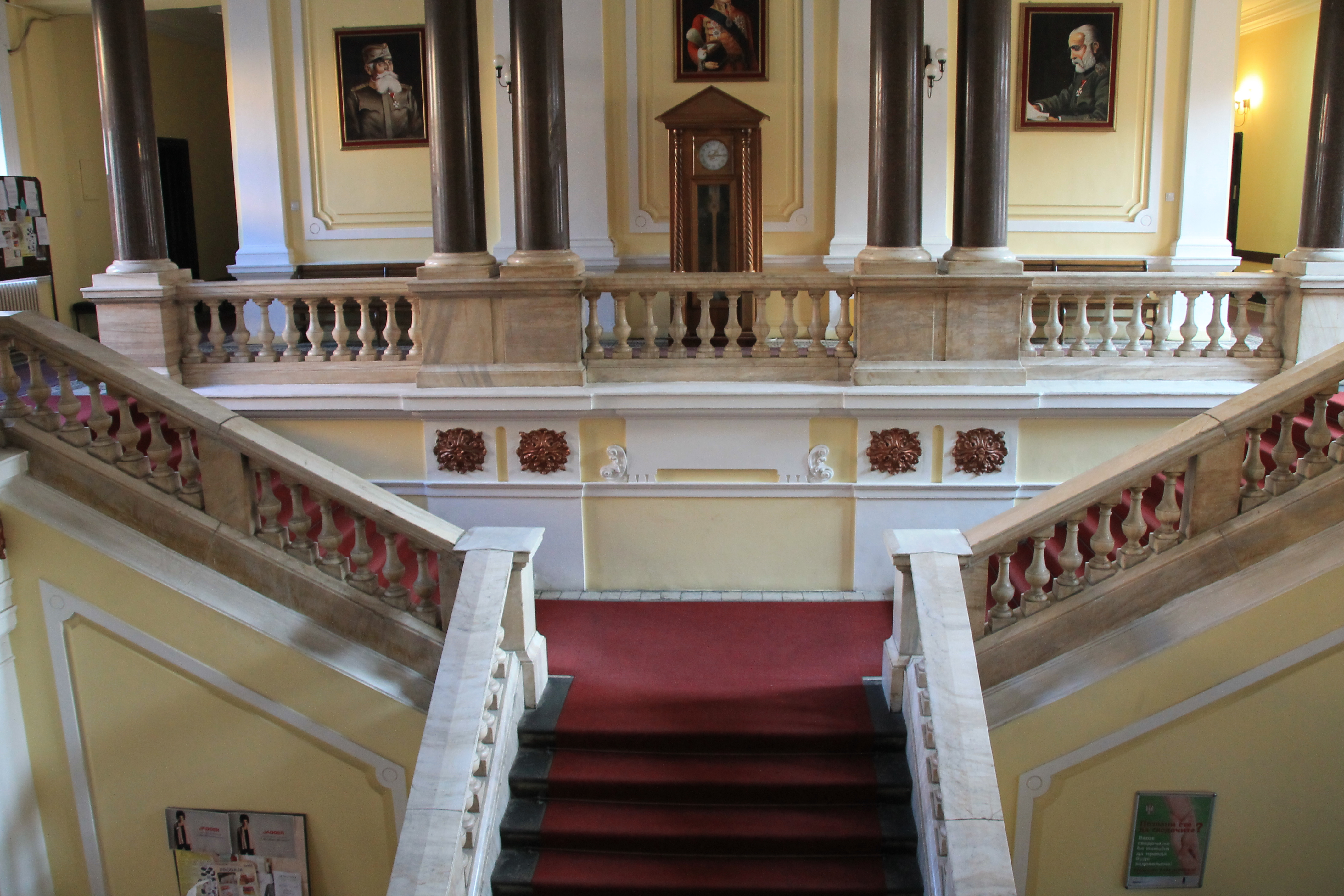 Zgrada Okružnog suda (Kragujevac)